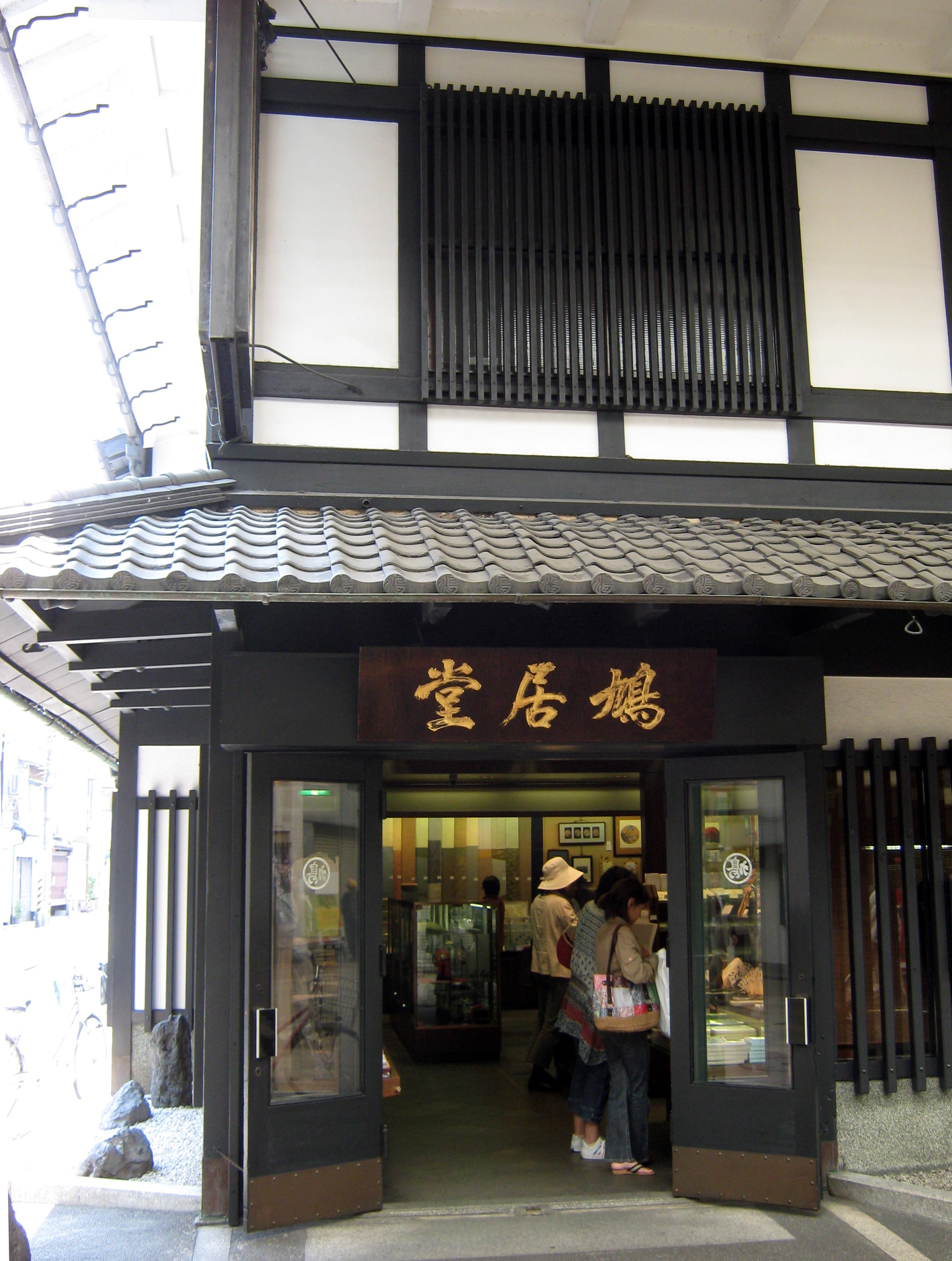 京都鳩居堂, 京都市中京区